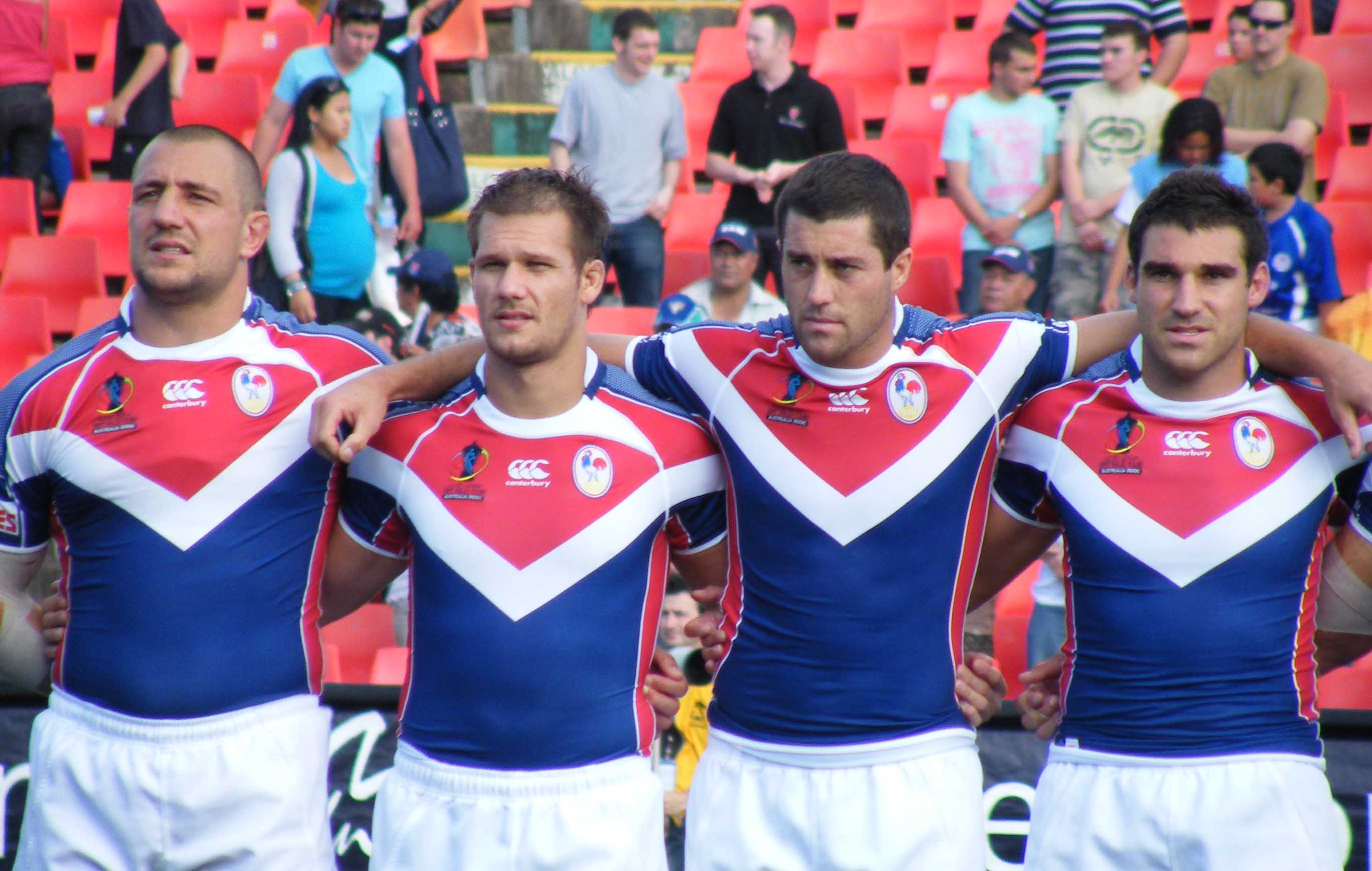 Équipe de France de rugby à XIII avant la rencontre contre les Samoa à la Coupe du monde 2008.